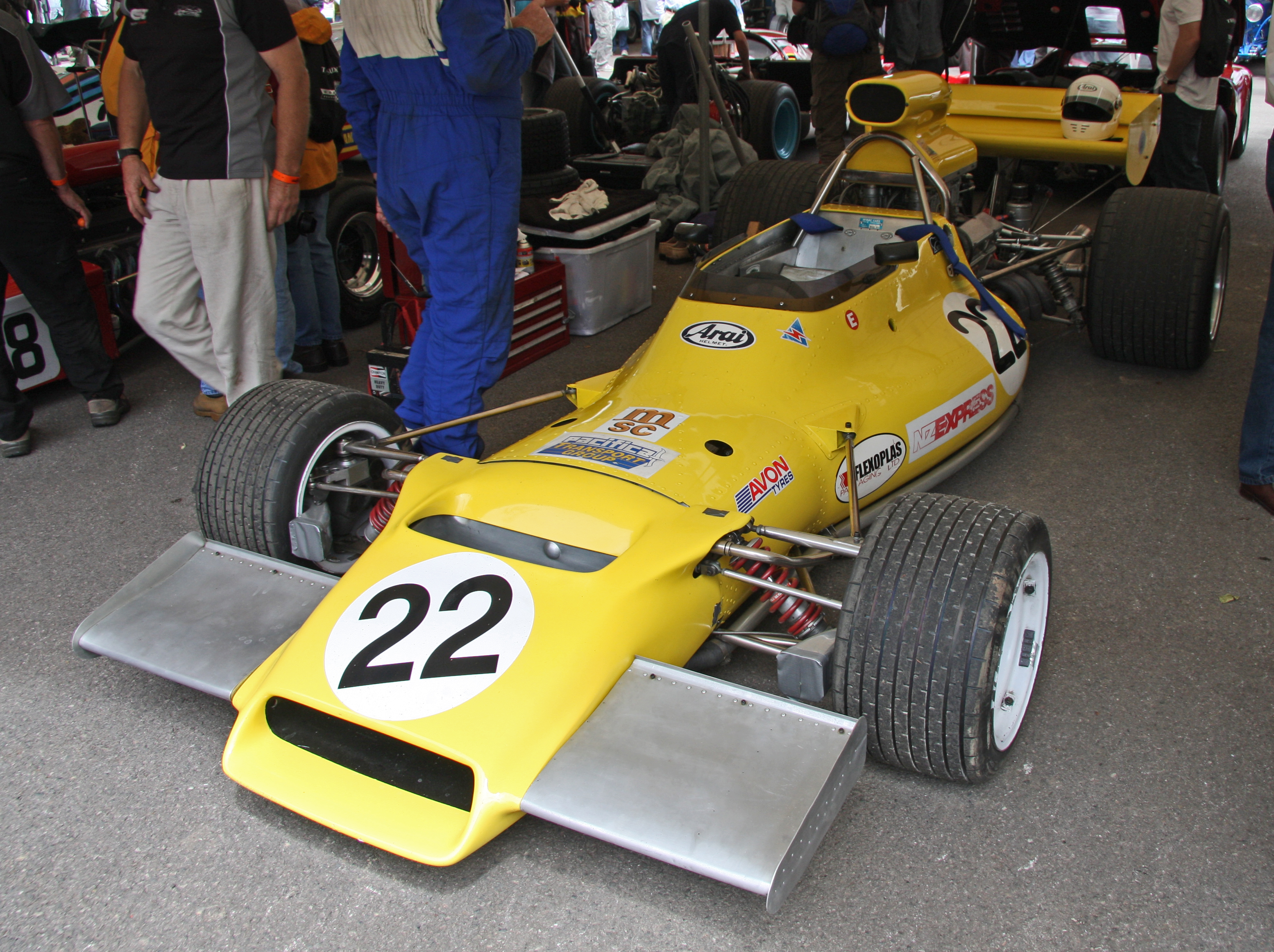 Built 1973. 5 litre V8